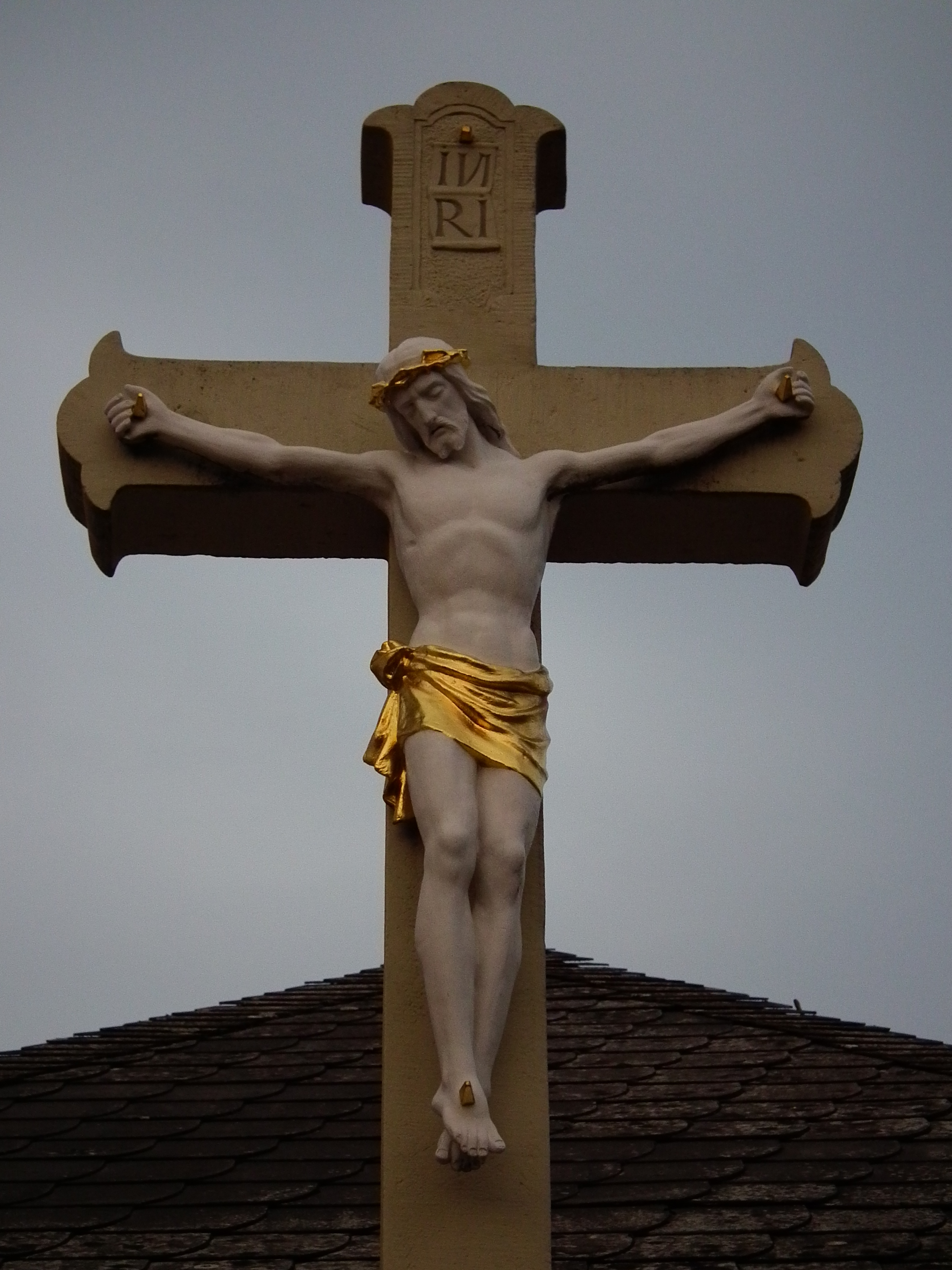 Gekreuzigter Christus am Kruzifix vor der katholischen Kirche St. Juliana in Malsch (Baden-Württemberg, Deutschland)